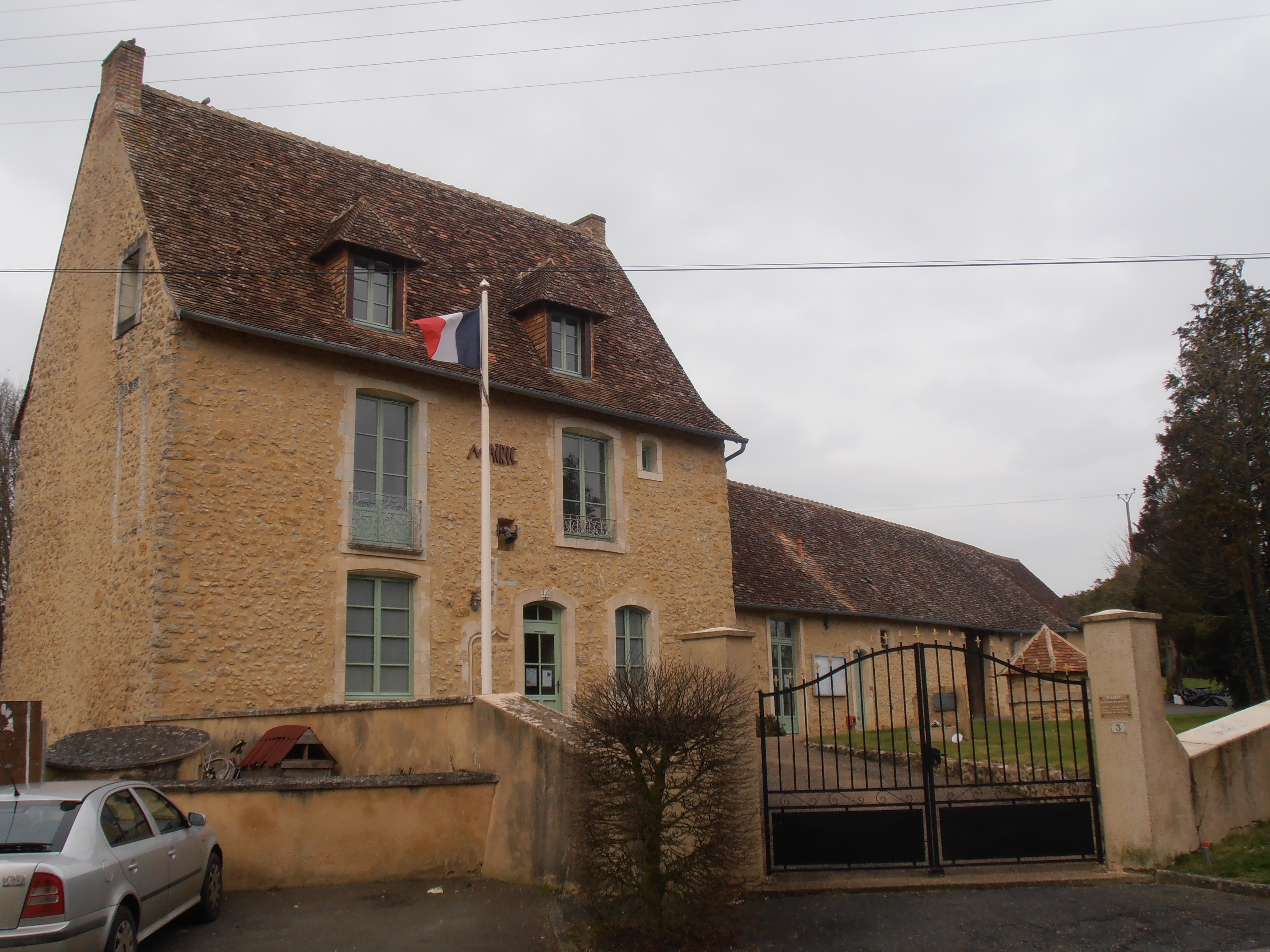 La mairie de Pirmil